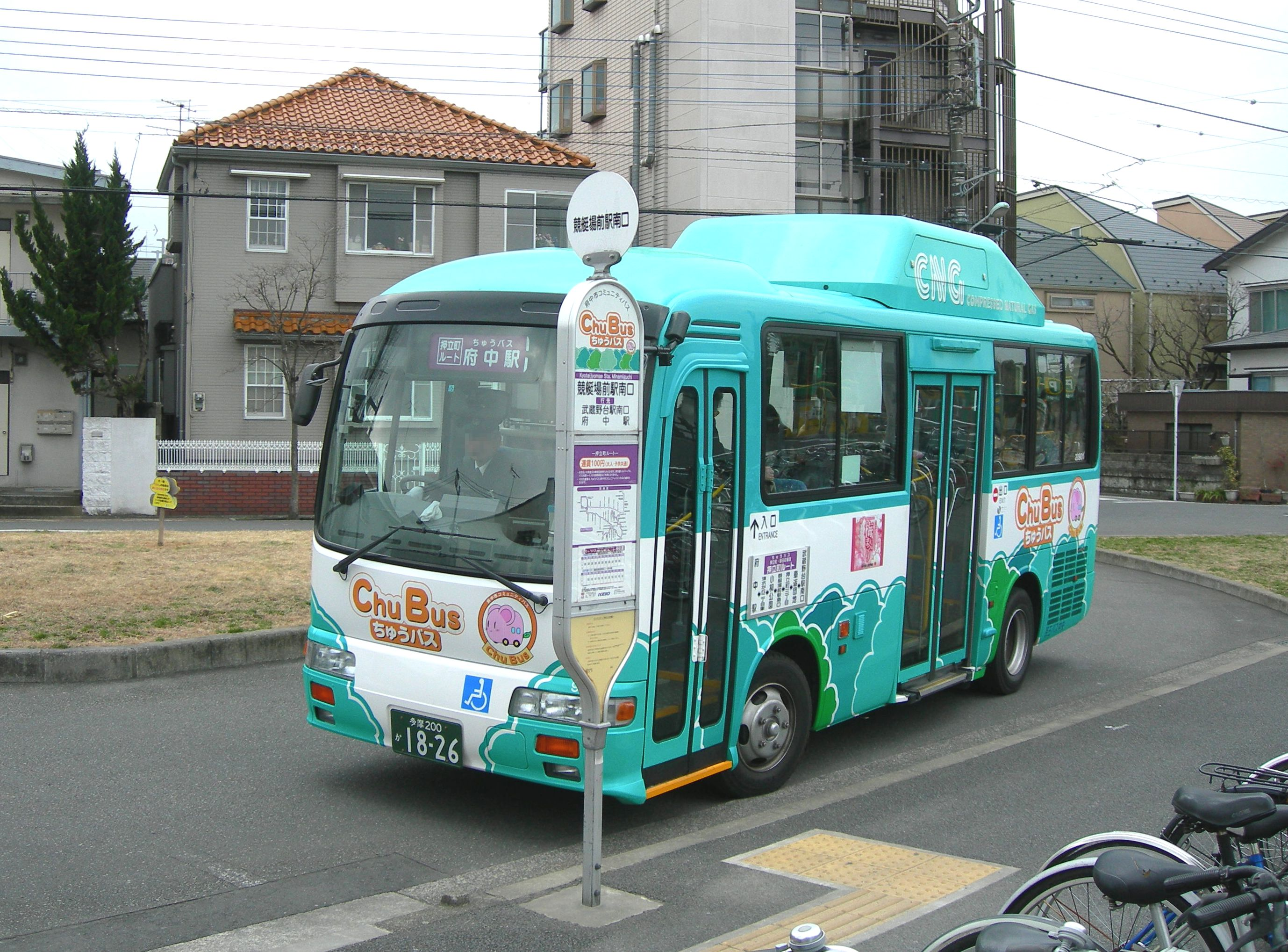 ちゅうバス（東京都府中市のコミュニティバス）